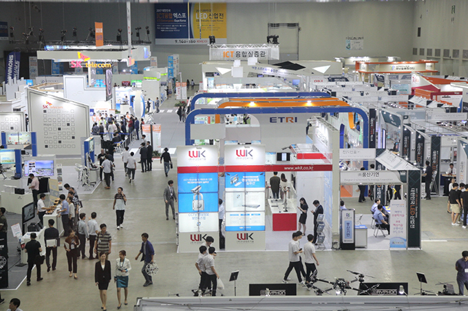 2017 대한민국ICT융합엑스포